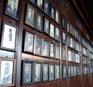 Kleine Kneipe der Landsmannschaft Schottland Tübingen